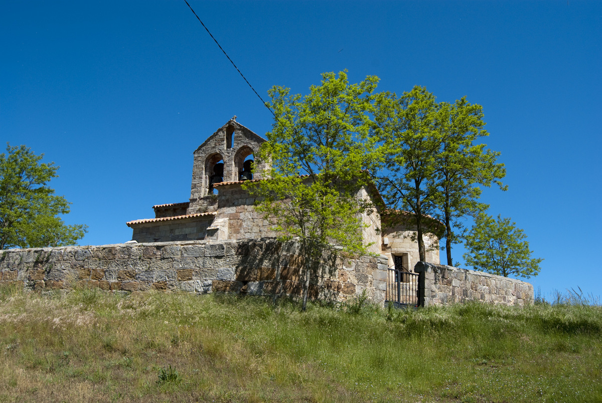 Iglesia de San Esteban. Lomilla. Palencia. España.